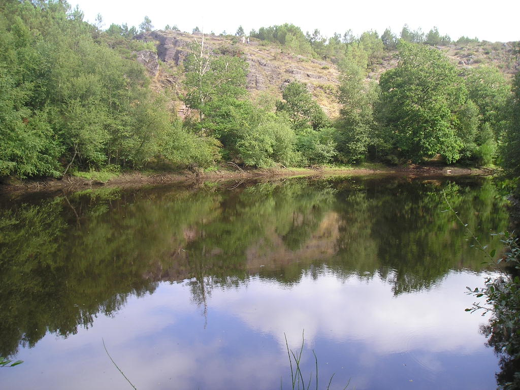 Miroir aux fées, au sein du Val sans retour, dans la forêt de Paimpont (Brocéliande)